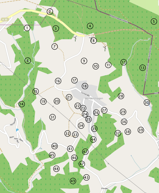 Historische Flurnamen des Dorfes Wendershagen (Gemeinde Morsbach)